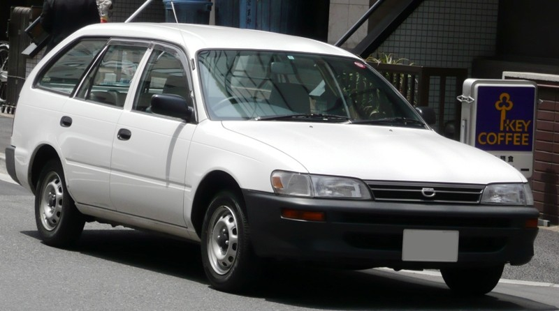 Toyota corolla EE102,1.3L CC, 4E-FE ENGINE,MANUAL TRANSMISSION.